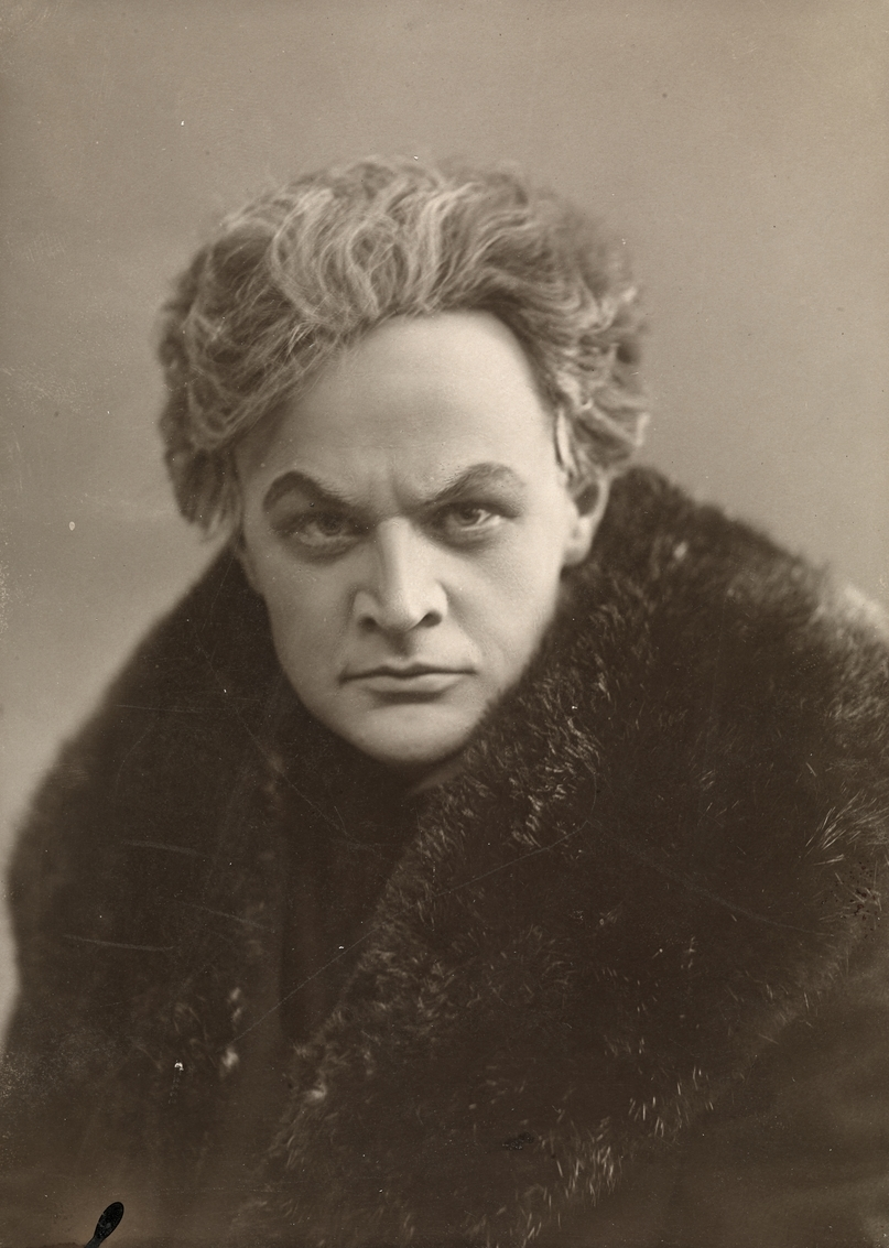 Rollebilde av Nicolay Johannsen i Rovedderkoppen fra 1910. Rovedderkoppen var en produksjon av Centralteatret, basert på en detektivkomedie av Stein Riverton (Sven Elvestad) med samme tittel.Depicted person: Nicolai Johannsen – Norwegian actor